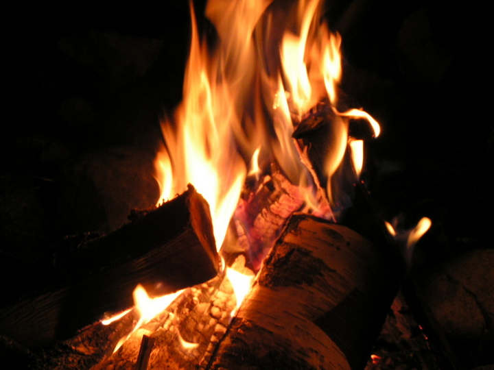 Ugnis